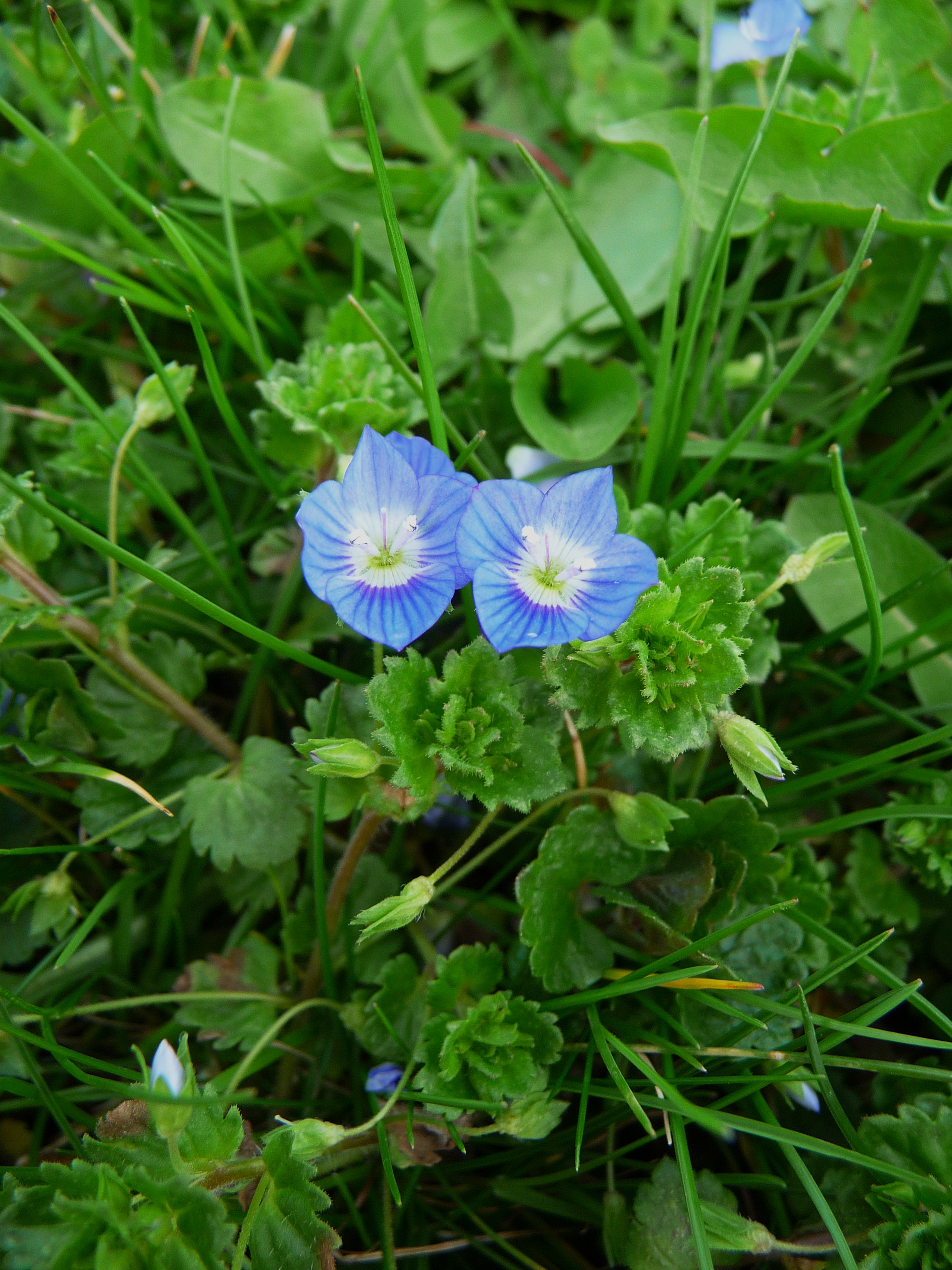 Persischer Ehrenpreis (Veronica persica), fotografiert in Heidelberg (Baden-Württemberg, Deutschland)